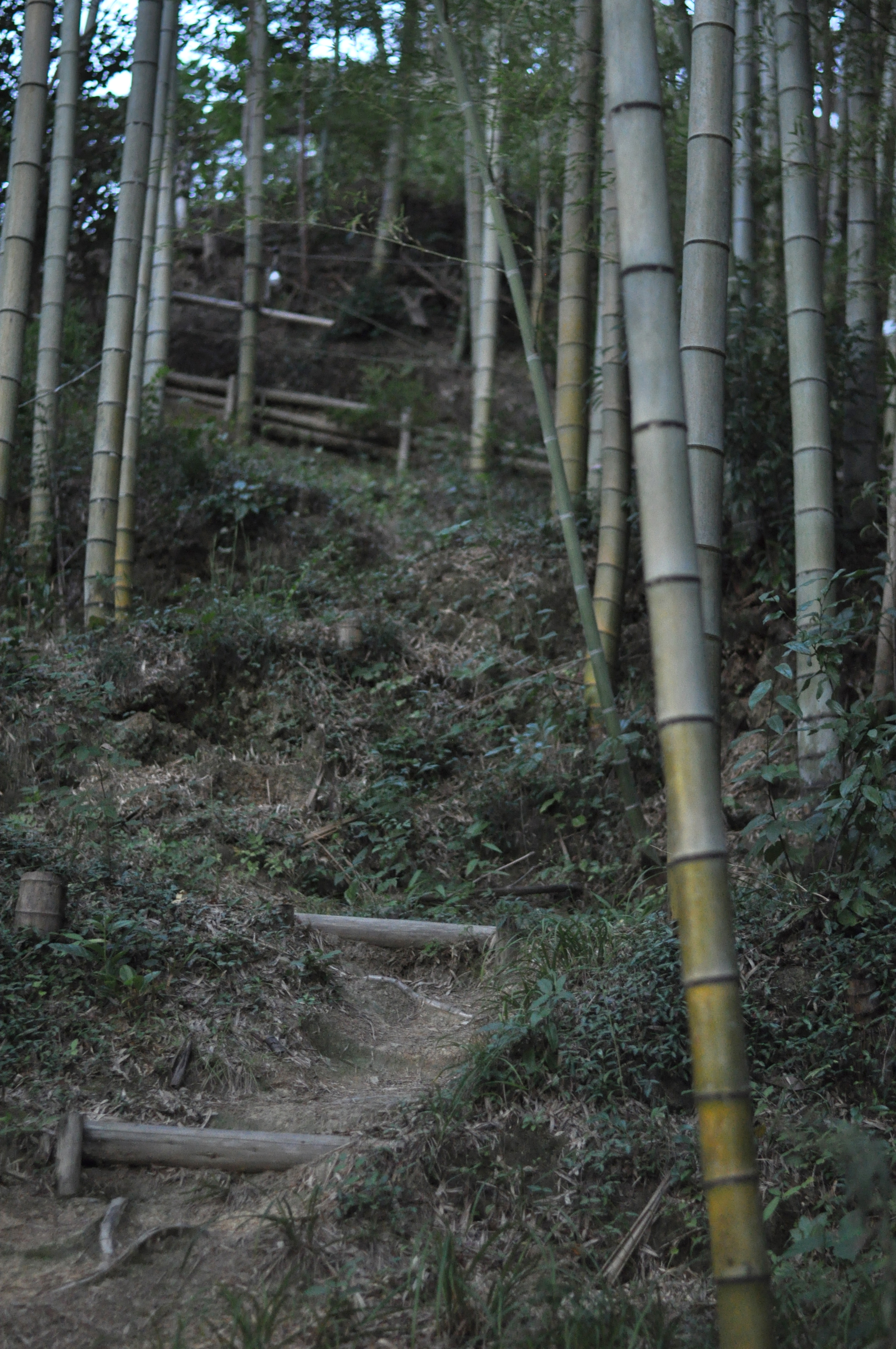 三重県伊勢市にある虎尾山